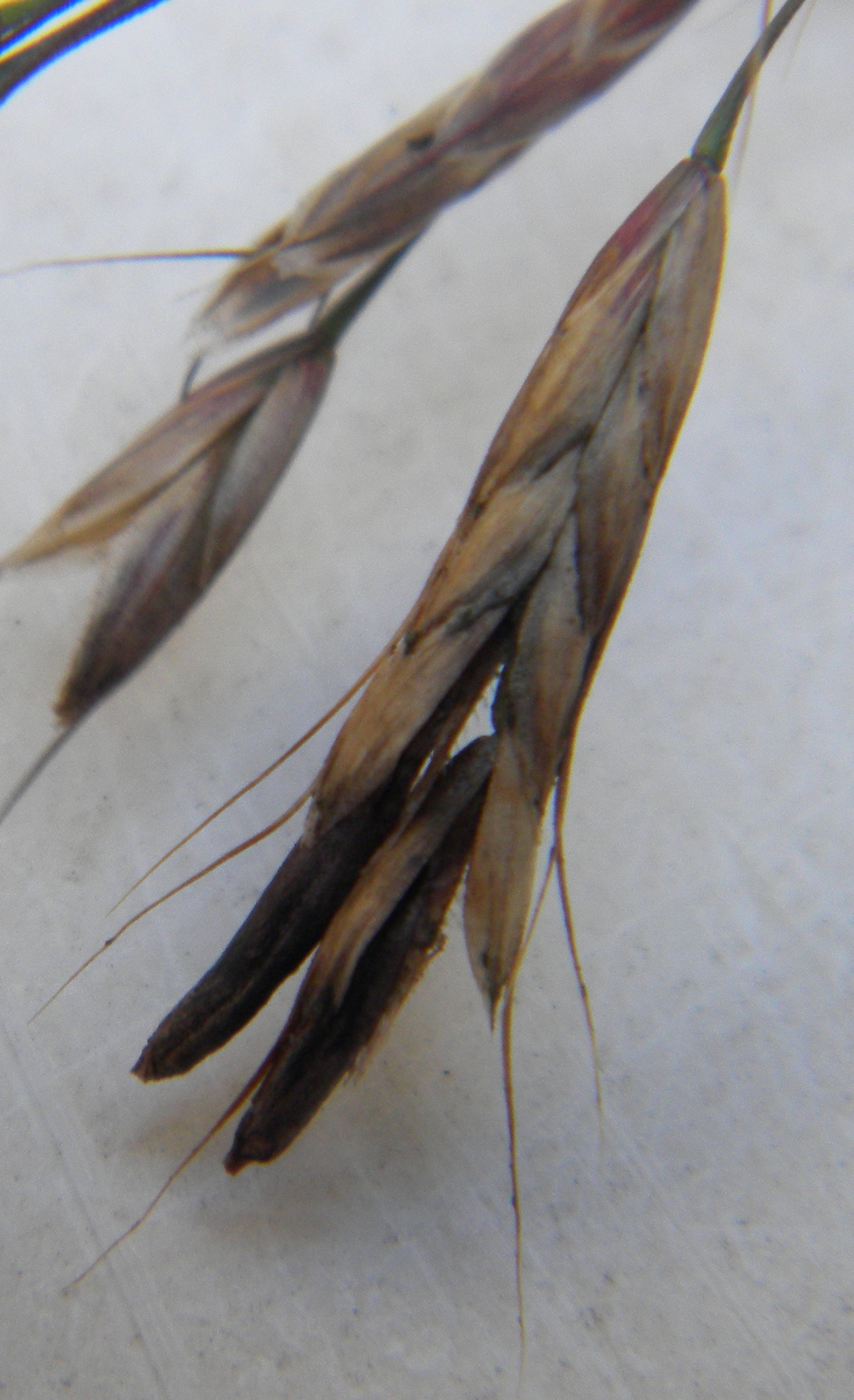 Bromus arvensis avec une attaque de Claviceps purpurea Champs de blé